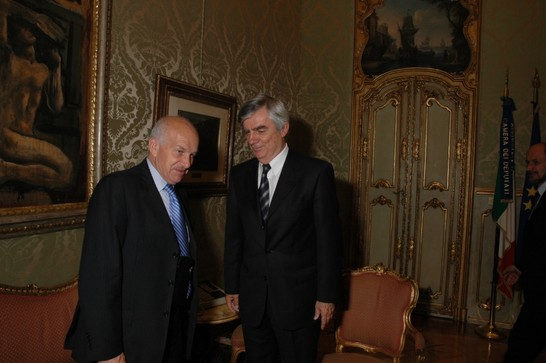 Il Presidente della Camera dei deputati, Fausto Bertinotti, riceve l'Ambasciatore di Francia, Yves Aubin de la Messuziere